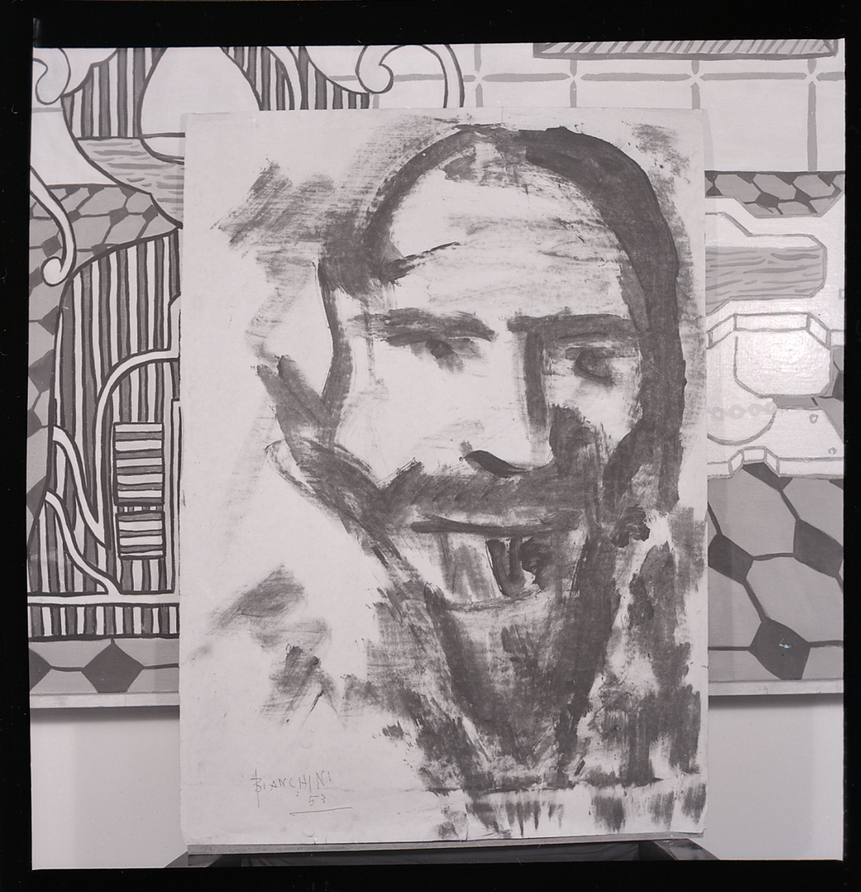 Servizio fotografico : Italia, 1960 / Paolo Monti. - Buste: 5, Fototipi: 8 : Negativo b/n, gelatina bromuro d'argento/ pellicola ; 6x6. - ((Serie costituita da 5 buste di negativi identificati con i nn.: 14377, 14378, 14379, 14380, 14381, 14382, 14383, 14384, e tenute insieme con da una graffetta. - Sulla busta identificata con il n. 14377 iscrizione didascalica manoscritta a pennarello: "Iran/ Bianchini". - Sulla busta identificata con la numerazione 14381/84 iscrizione documentaria manoscritta a penna: "Duplicati". - La busta identificata con la numerazione 14381/84 contiene 4 negativi non identificabili singolarmente.